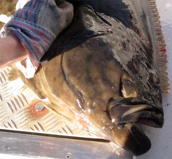 Flétan atlantique (Hippoglossus hippoglossus) sur un bâteau de pêche (Îles-de-la-Madeleine)